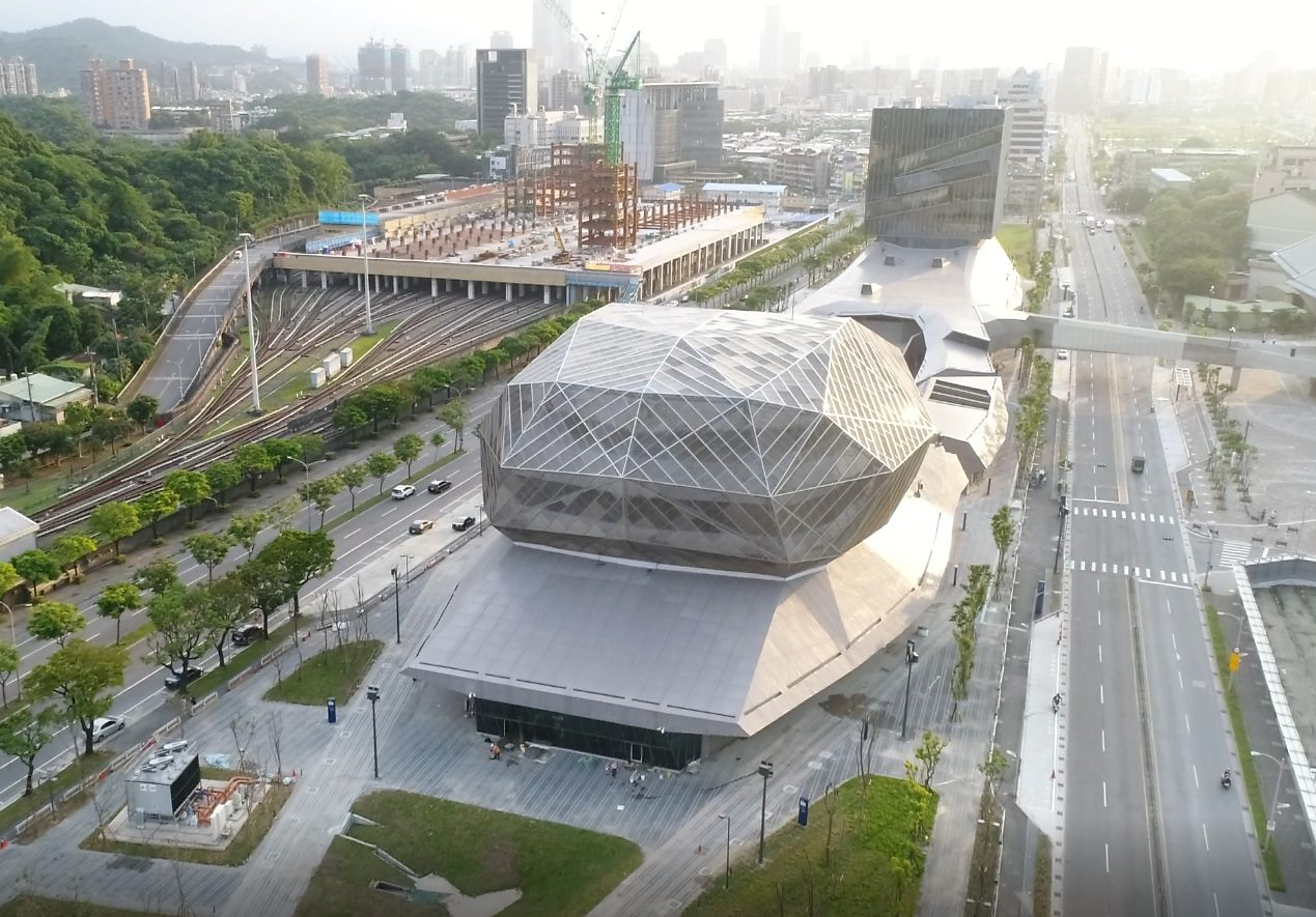 中文（台灣）: 北部流行音樂中心興建工程(南基地) Attribution: 臺北市政府工務局新建工程處